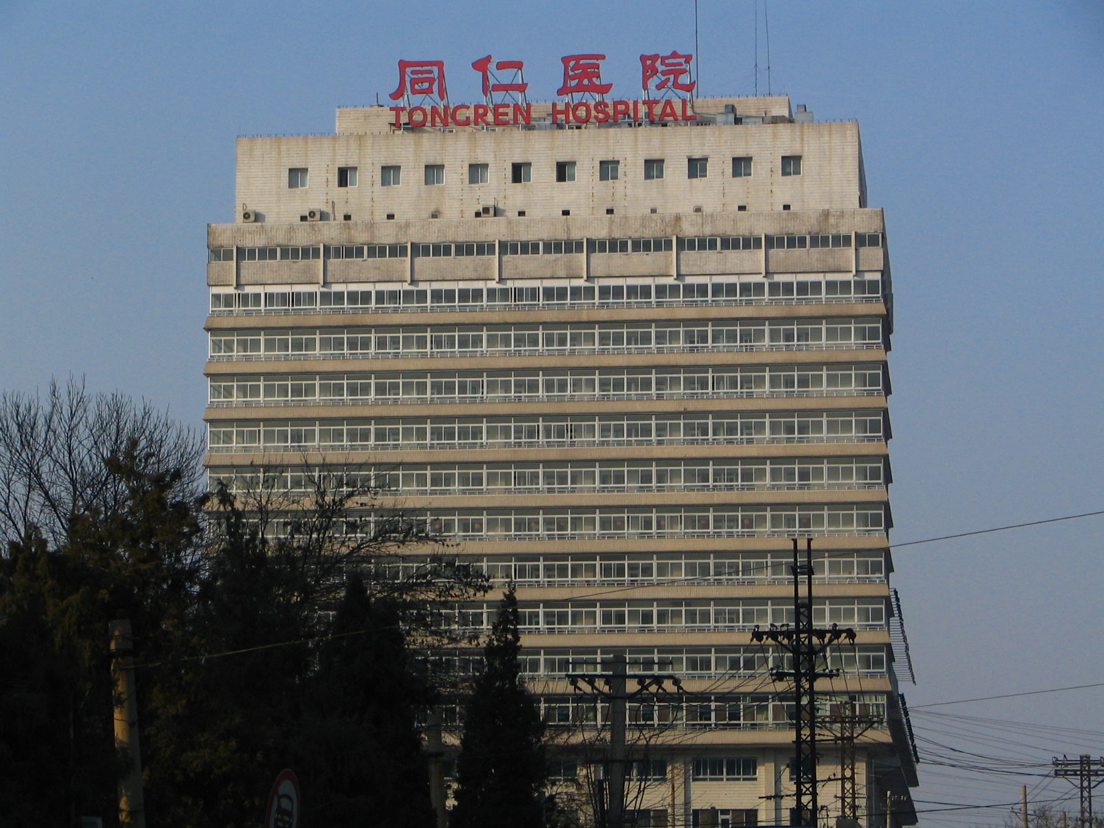 同仁医院 (Beijing Tongren Hospital)